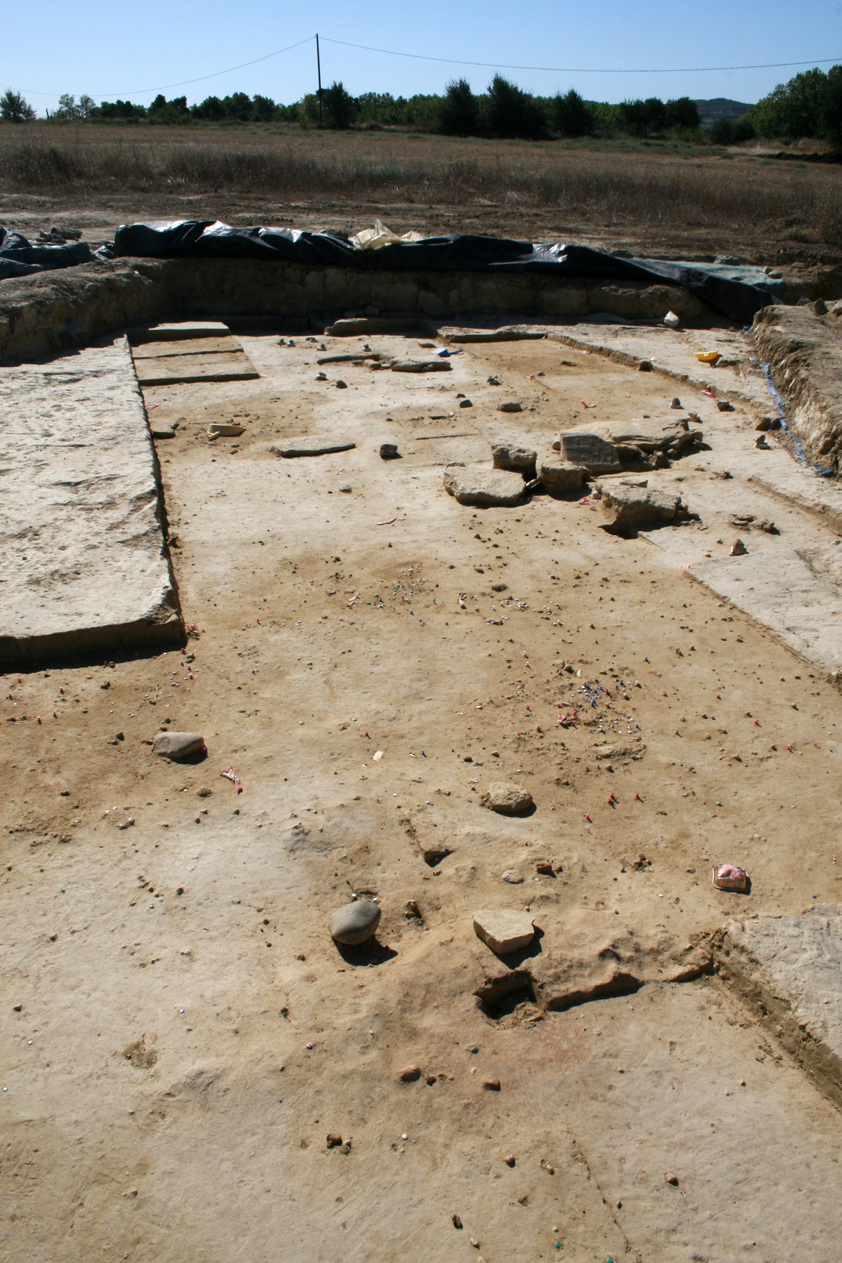 site archéologique de Régismont-le-Haut (Poilhes, Hérault, France) lors de la campagne de fouille 2009